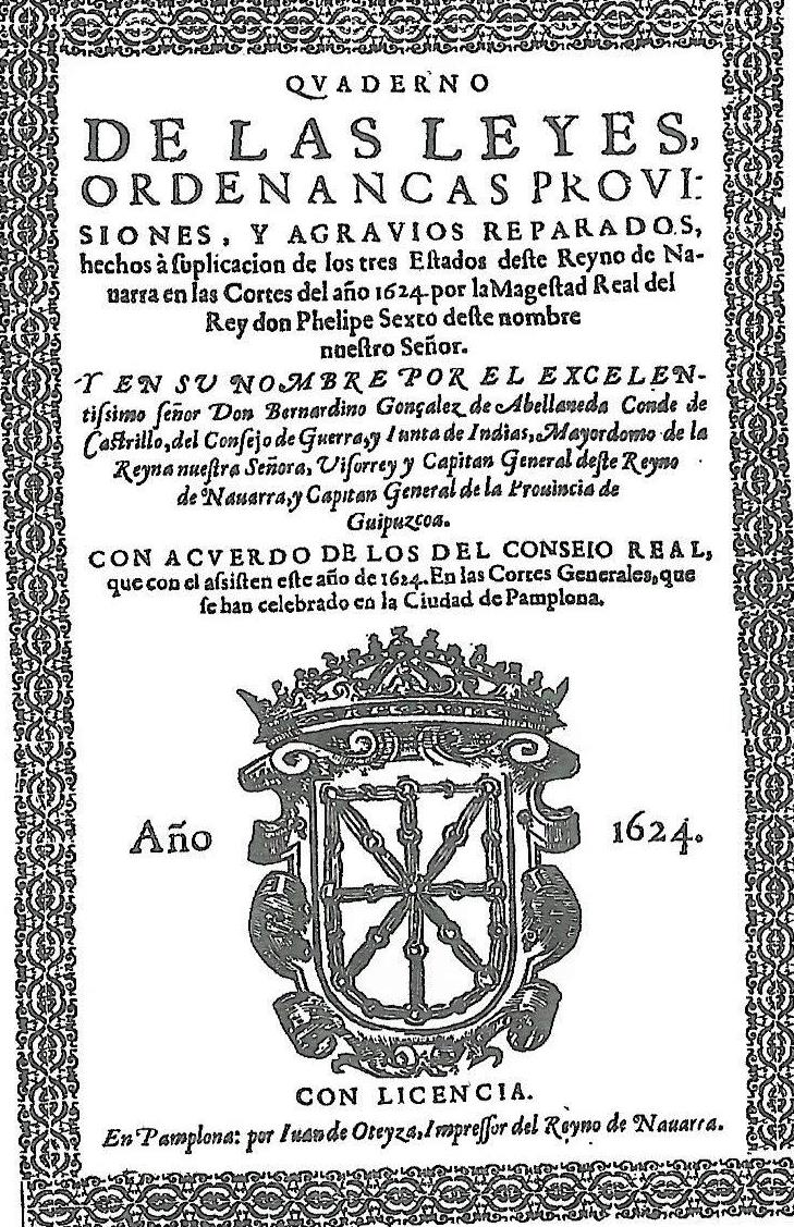 Juan Oteiza, impresor, Pamplona, 1624. Cuaderno de las leyes de las Cortes de Navarra de 1624